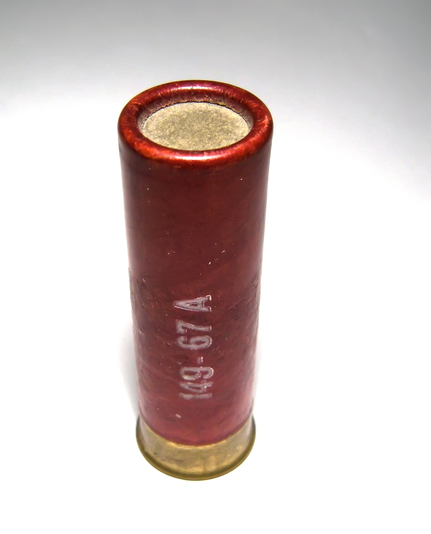 Cartouche de marquage 50 pour Tube roquette 58/80